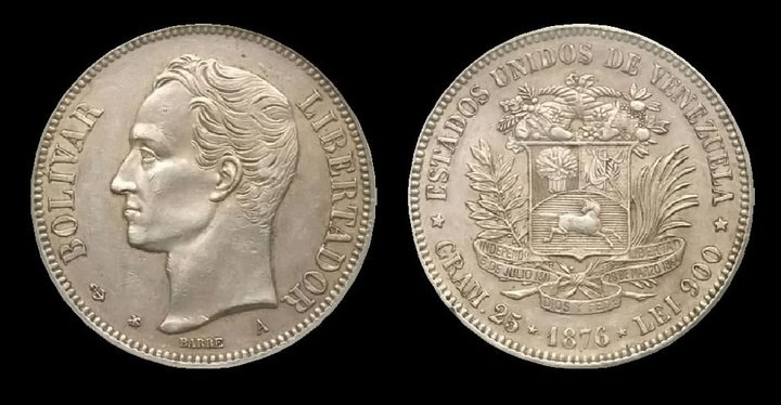 1 Venezolano 1876